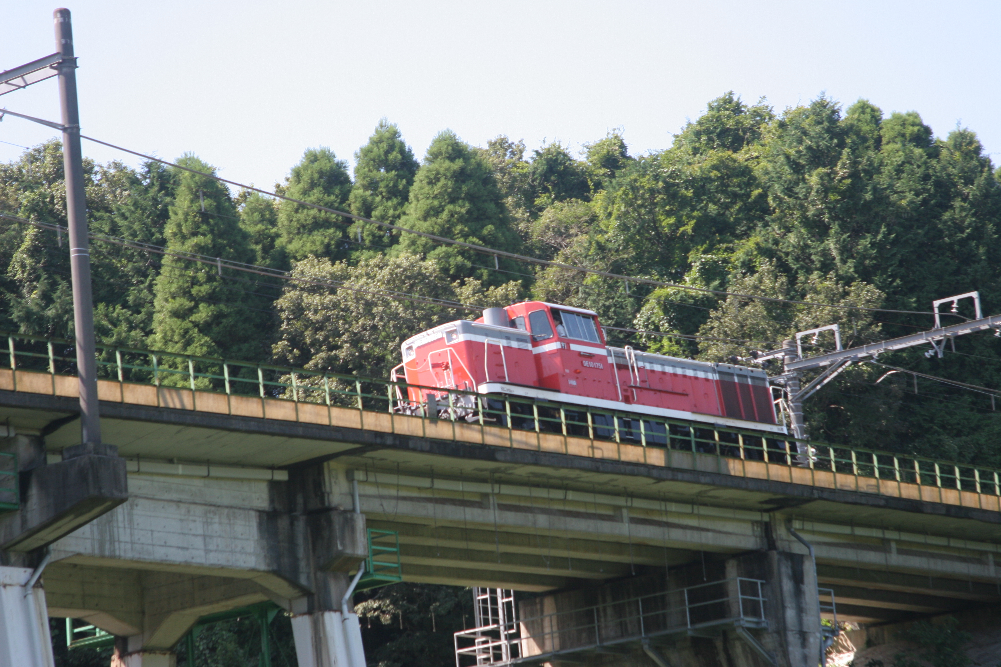 2010年9月26日に外房線でお召し列車が運転された際の露払い列車DE10 1751